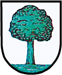 Herb Jasiony (gmina Zbrosławice, powiat tarnogórski, województwo śląskie, Polska)